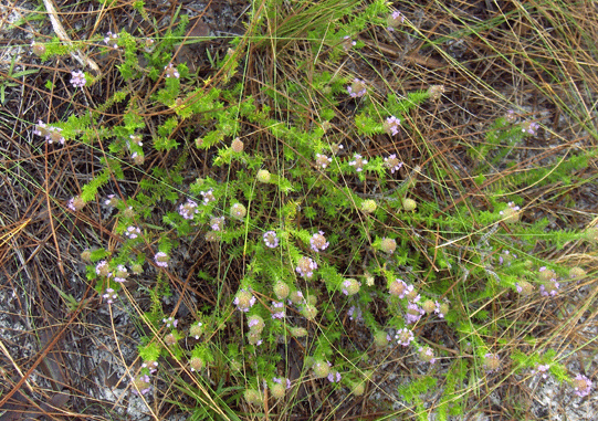 Pennyroyal